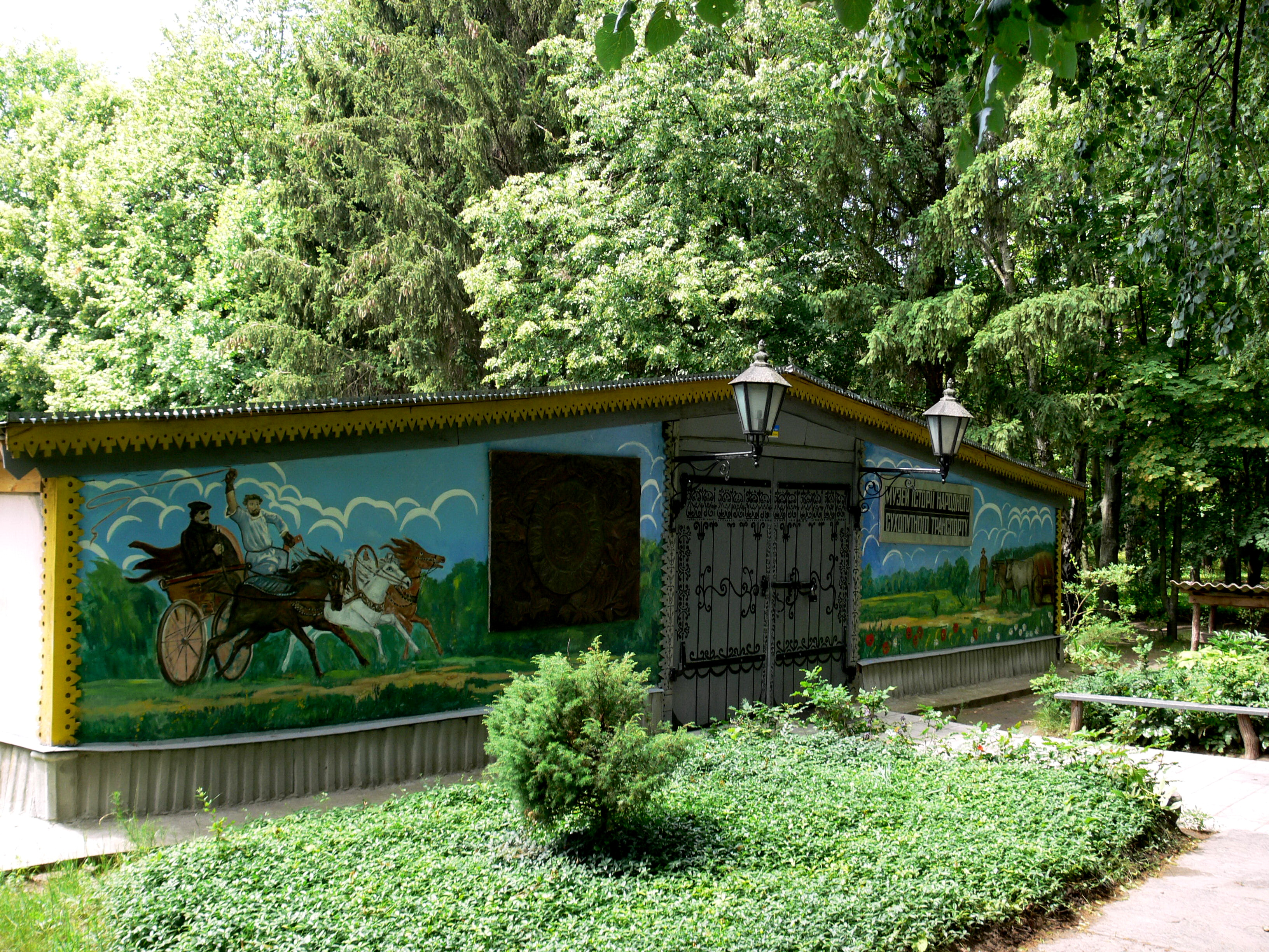 1. Зовнішній вигляд входу Музею народного сухопутного транспорту., Народний сухопутний транспорт